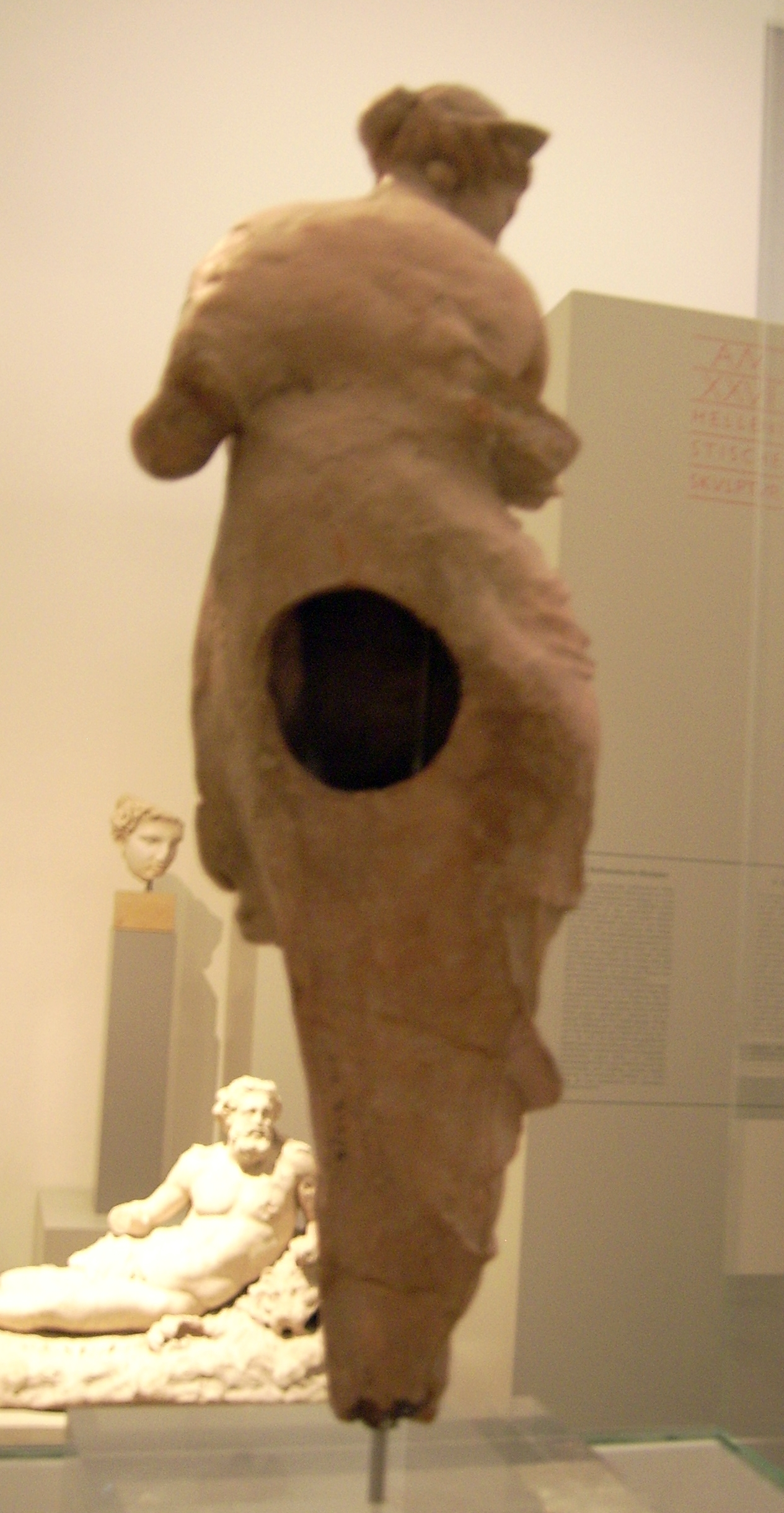 Tonfigur der Aphrodite; 2. Jh. v. Chr., aus Kleinasien, 1930 für die Antikensammlung Berlin aus der Sammlung Heil erworben, Höhe 37,6 cm, wenige Farbspuren, Inventarnummer 31272